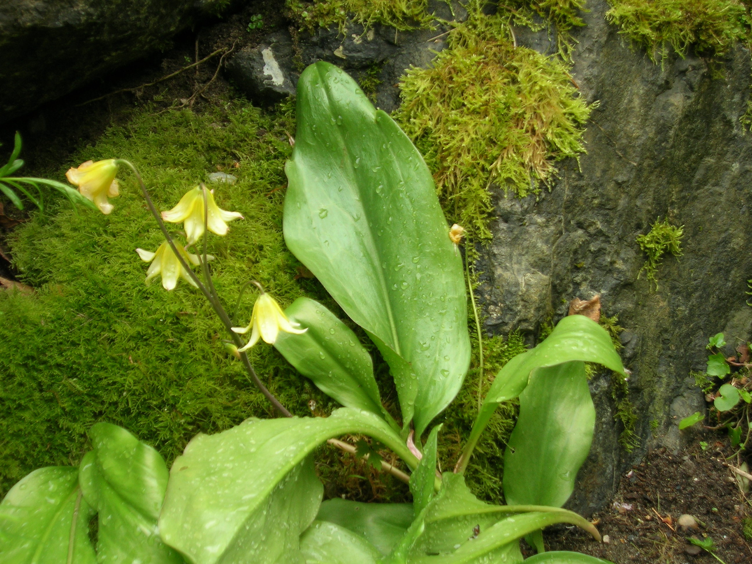 i041607 207